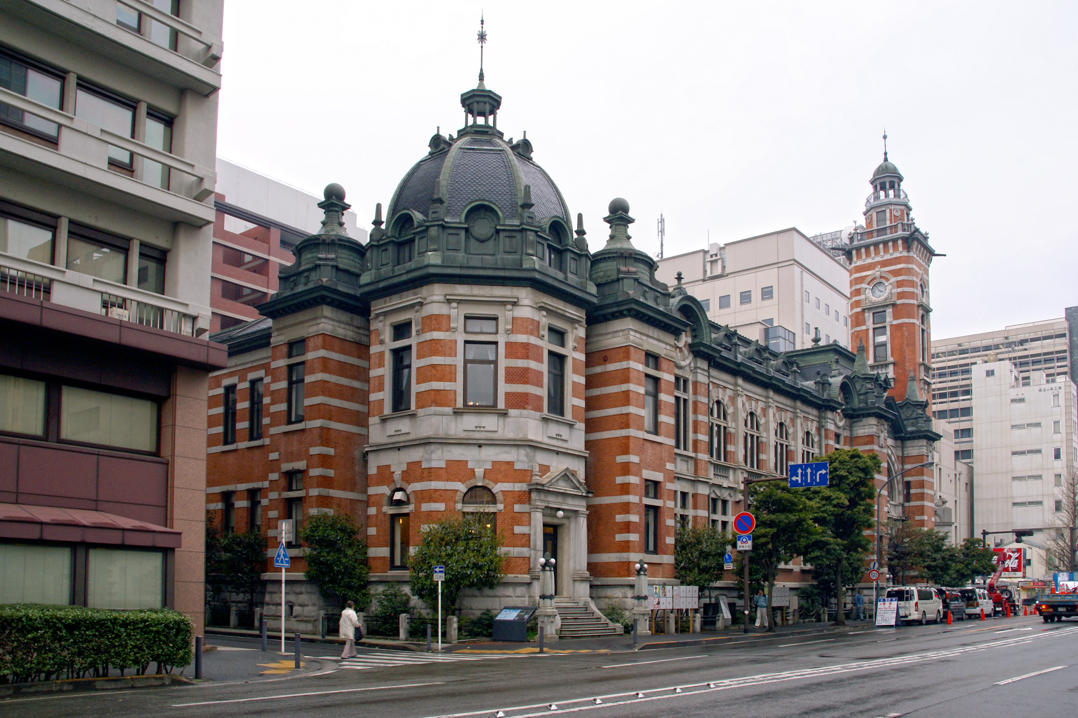 Yokohama Port Opening Memorial Hall in Yokohama, Japan